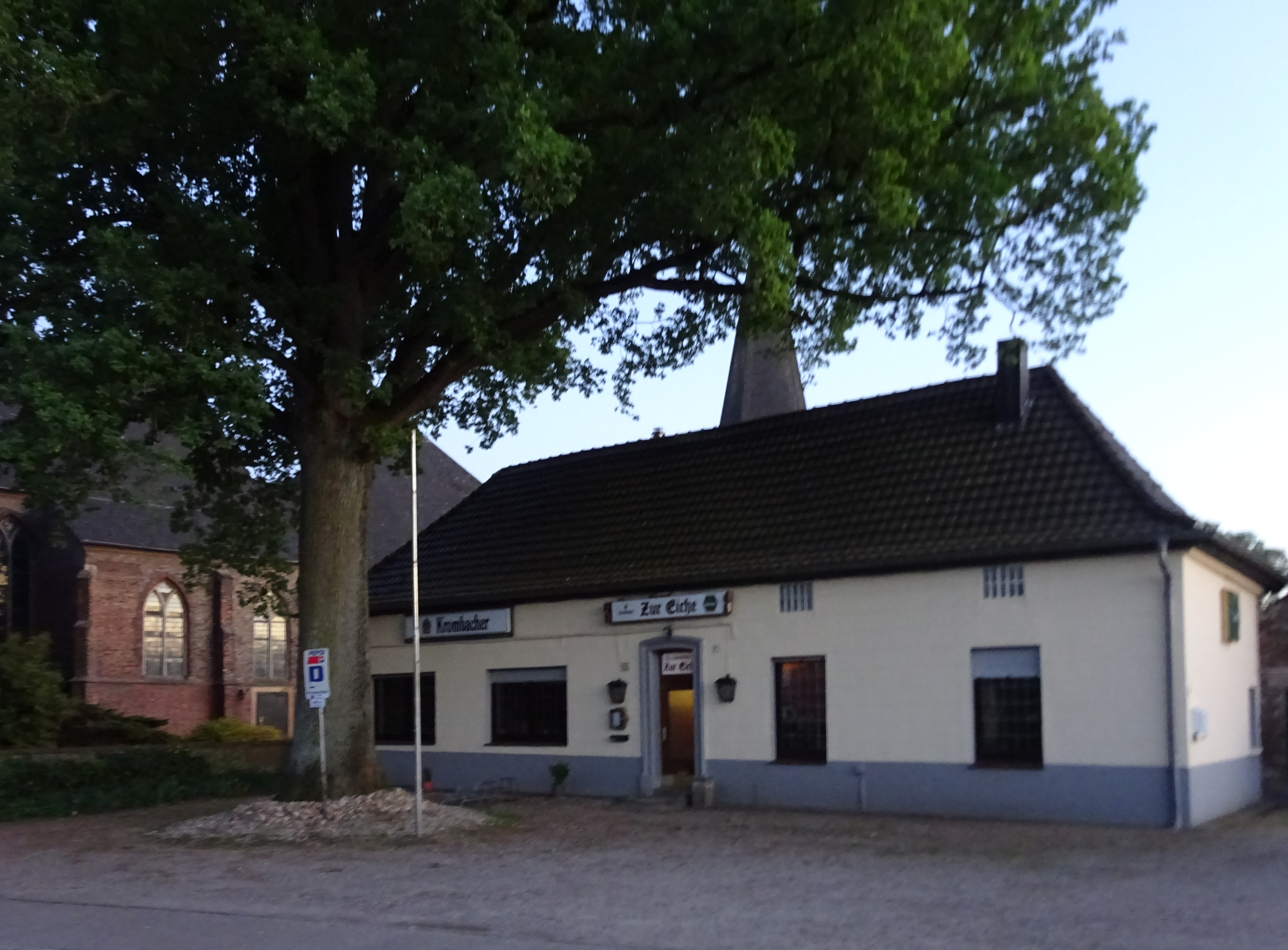 Gasthof Zur Eiche, St. Lambertus-Straße 21, Kalkar-Appeldorn